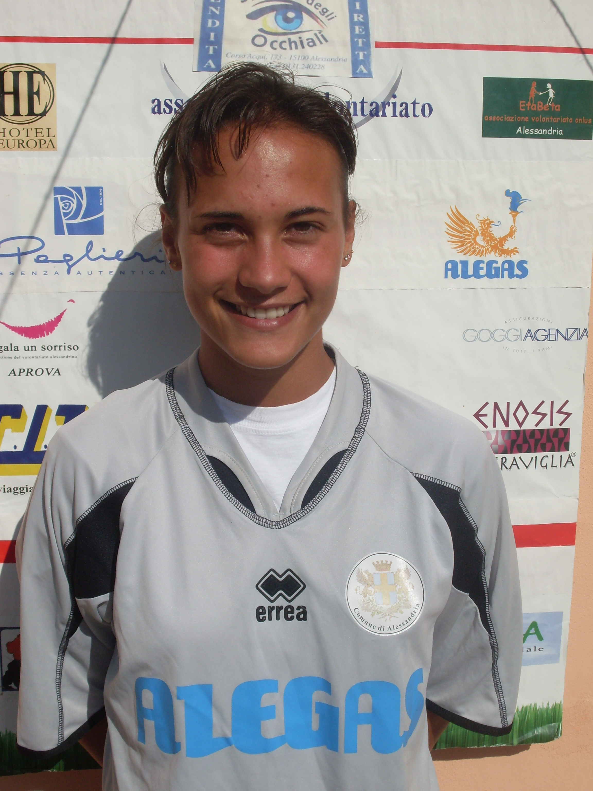 Centrocampista